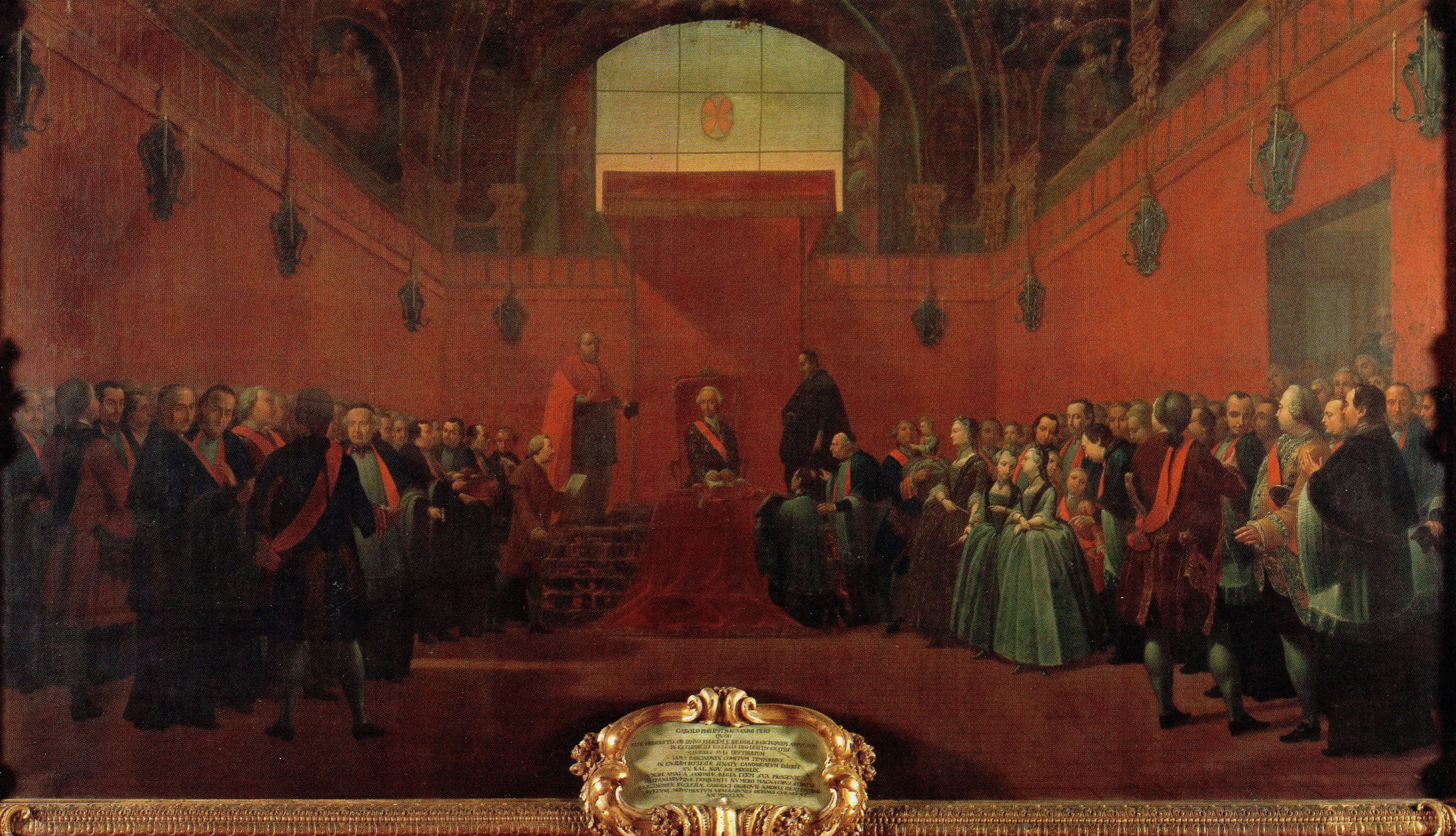 1770. Sala Capitular, catedral de Barcelona, Manuel Tramulles i Roig